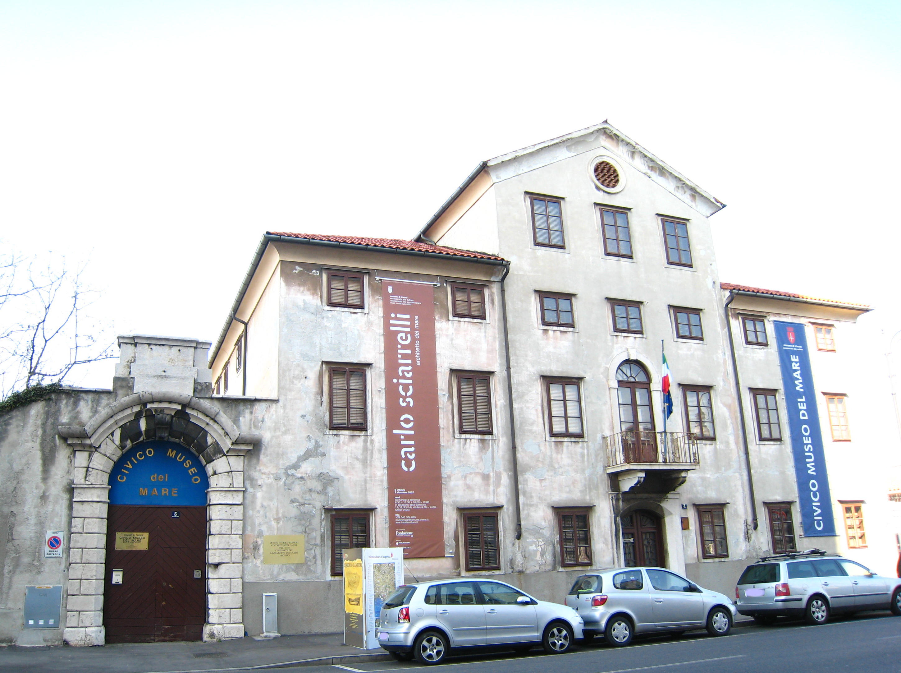 La sede del Museo del Mare (Trieste). Febbraio 2008